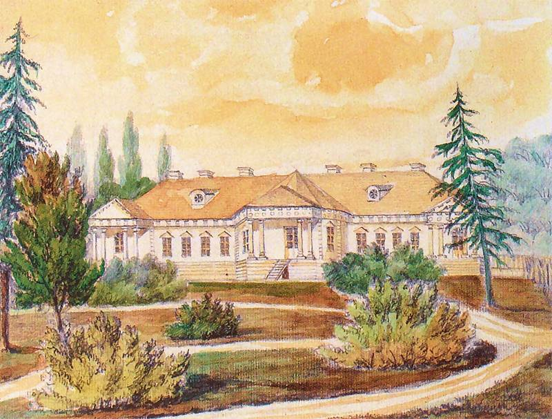 Беларуская (тарашкевіца): Моладаў (Moładaŭ), сядзіба Скірмунтаў (Skirmunt)